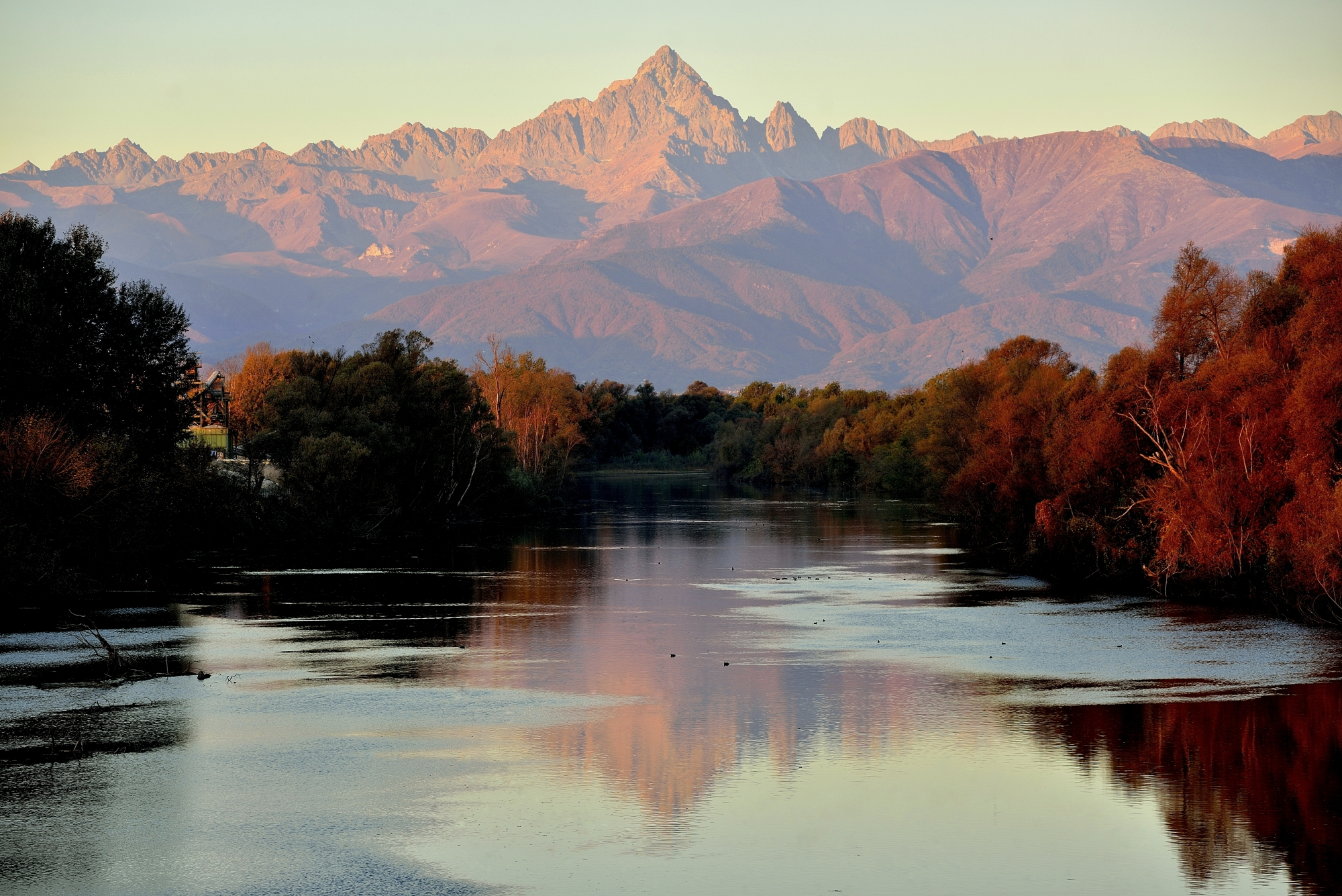 Parco del Monviso (Q47192508)